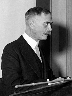 Karl Landsteiner in Stockholm